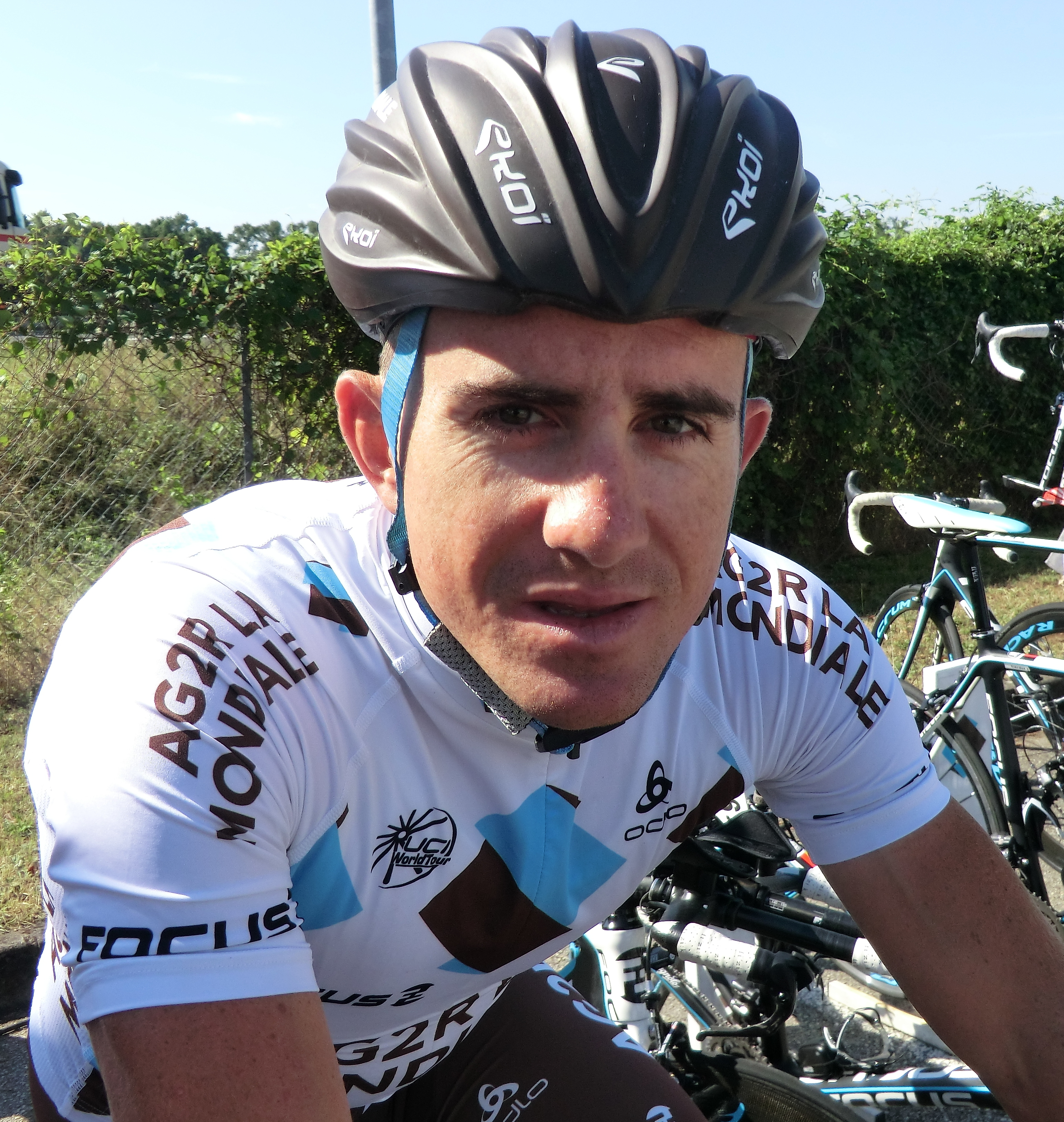 Coureurs à l'échauffement au matin du prologue du tour de l'Ain 2013, à l'hôtel Lyon-Est à Saint-Maurice-de-Beynost.